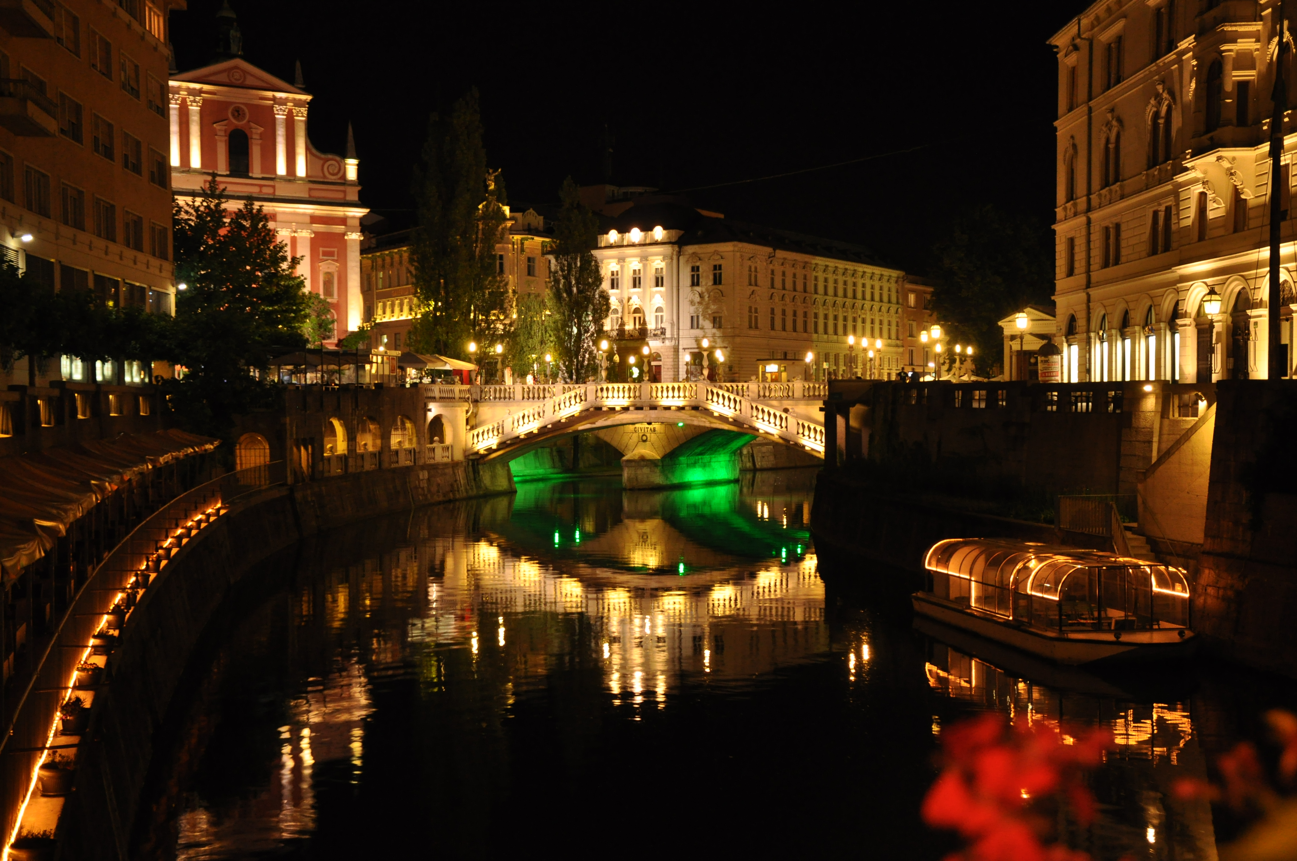 Plečnikovo Trojmostí v Ljubljani